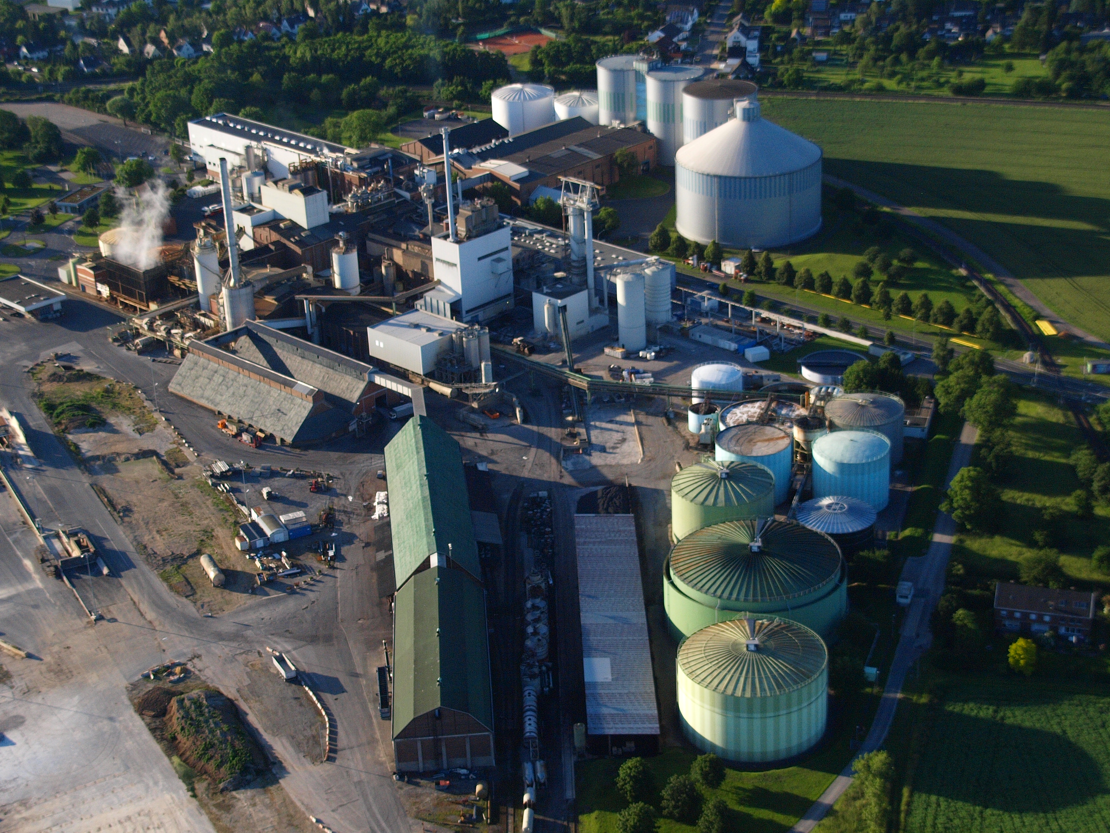 Pfeifer & Langen, Euskirchen: Luftaufnahme